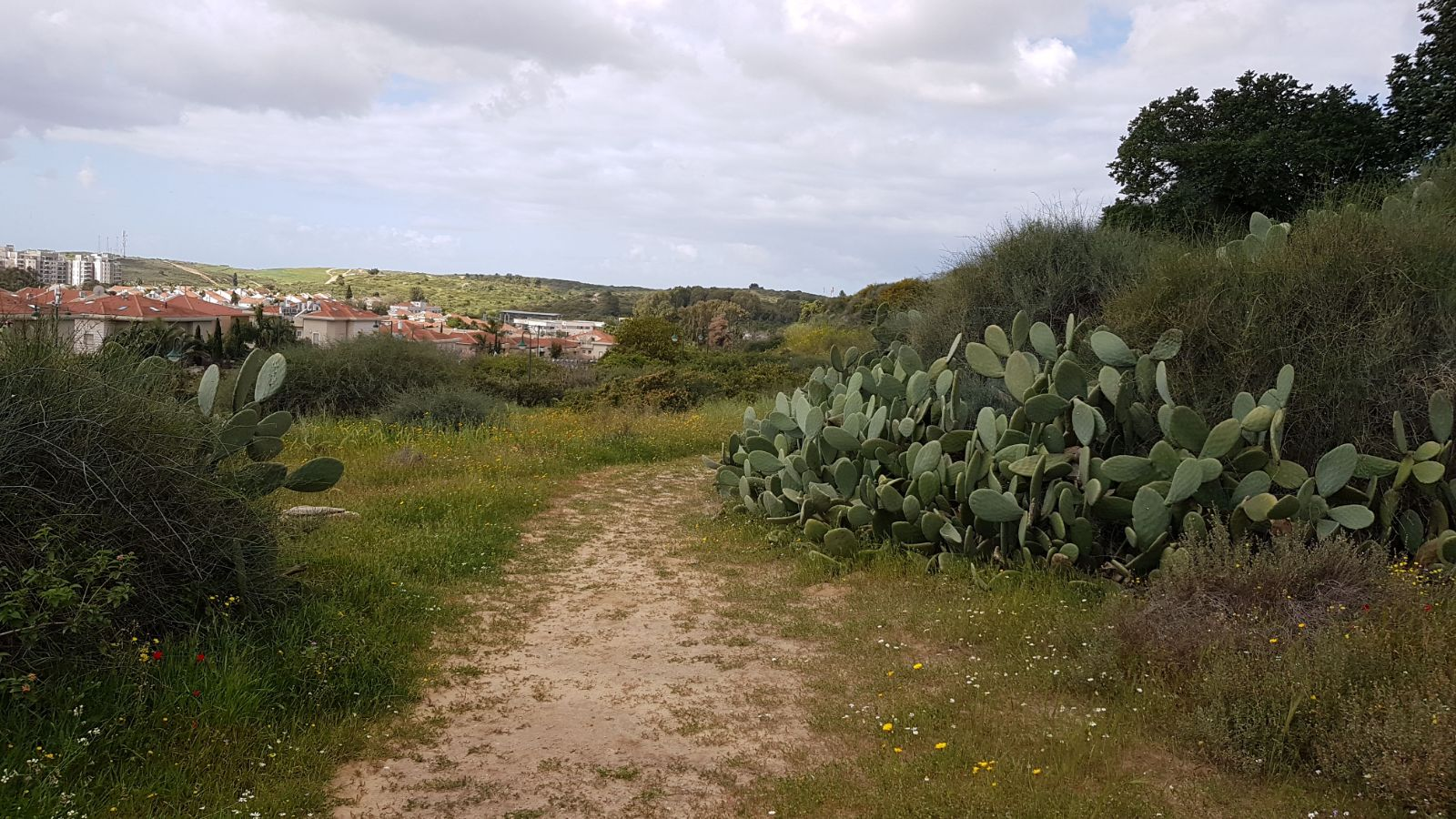 גבעת התור